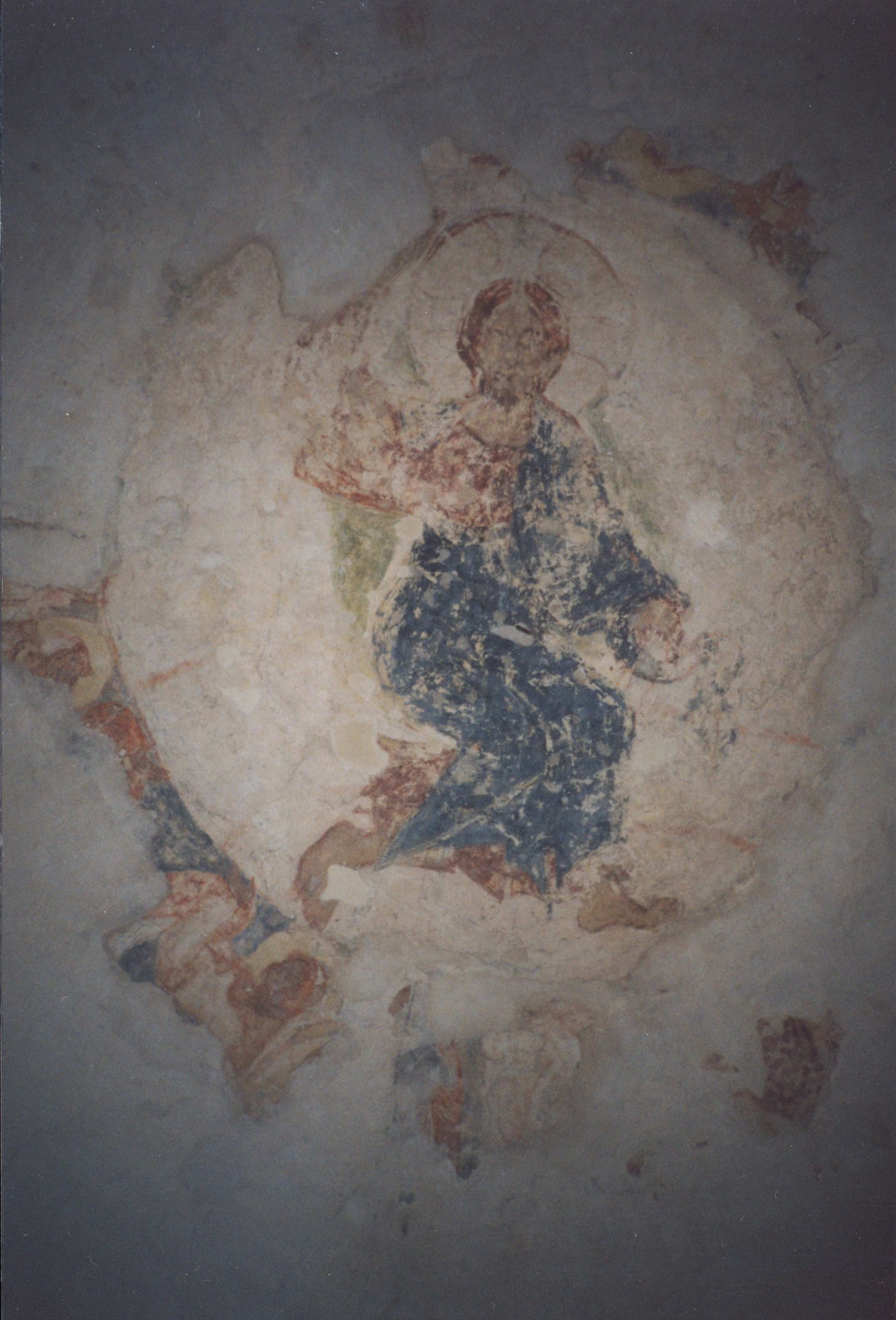 Фреска Вознесение господне. 1313 год.